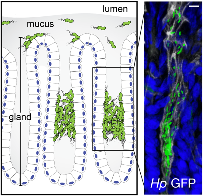 Fig. 1_Población bacteriana dentro de una Glándula individual. Glándulas y sus relaciones con H.pylori. Mucus en gris. H.pylori (en verde). Imágenes confocales 3D de bacteria asociada a glándula gástrica en ratón infectado por Hp teñida con GFP. Núcleos en azul (DAPI), F-actina (blanco), GFP (verde) Barra 10 μm.